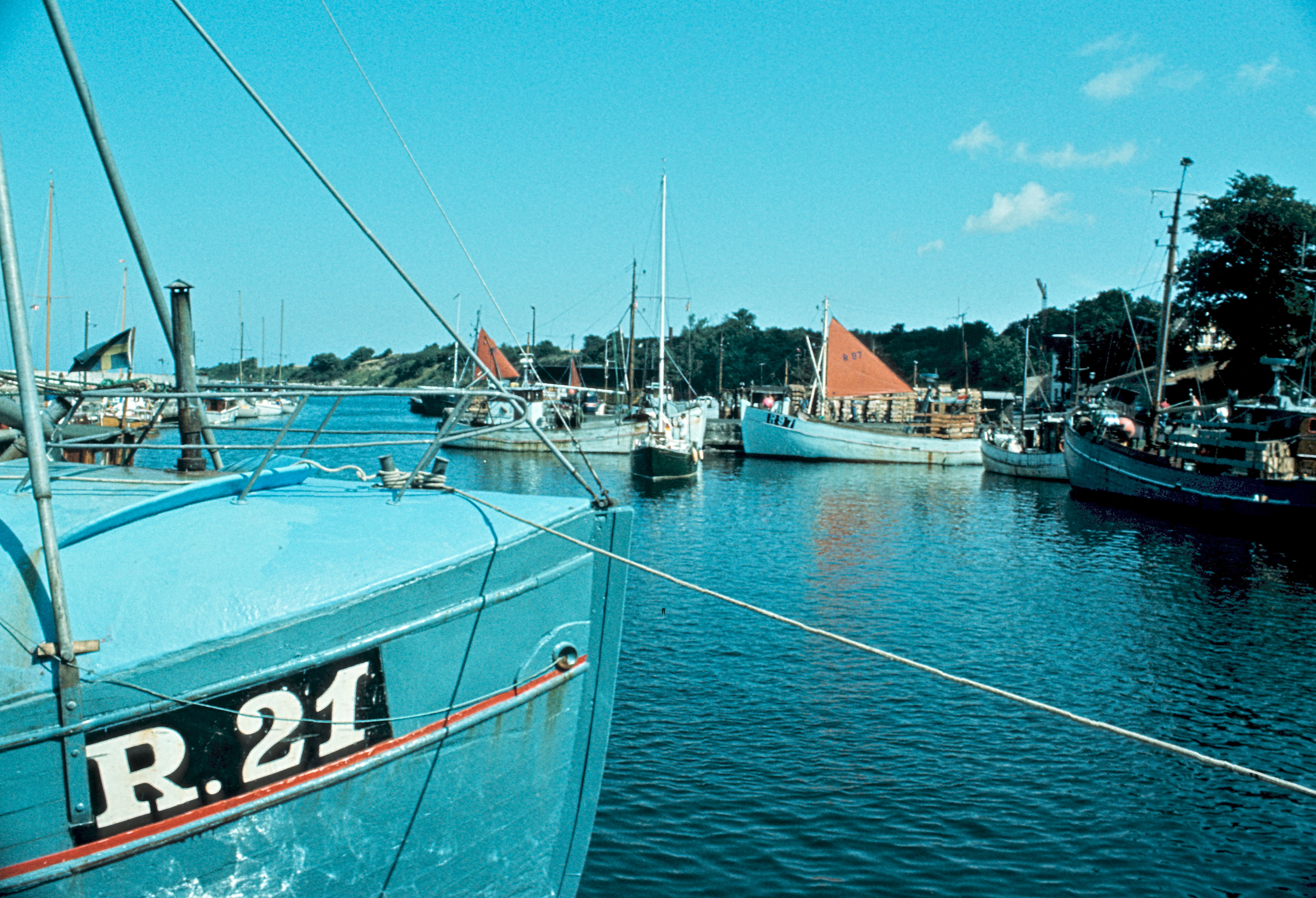 Hasle havn, 1973